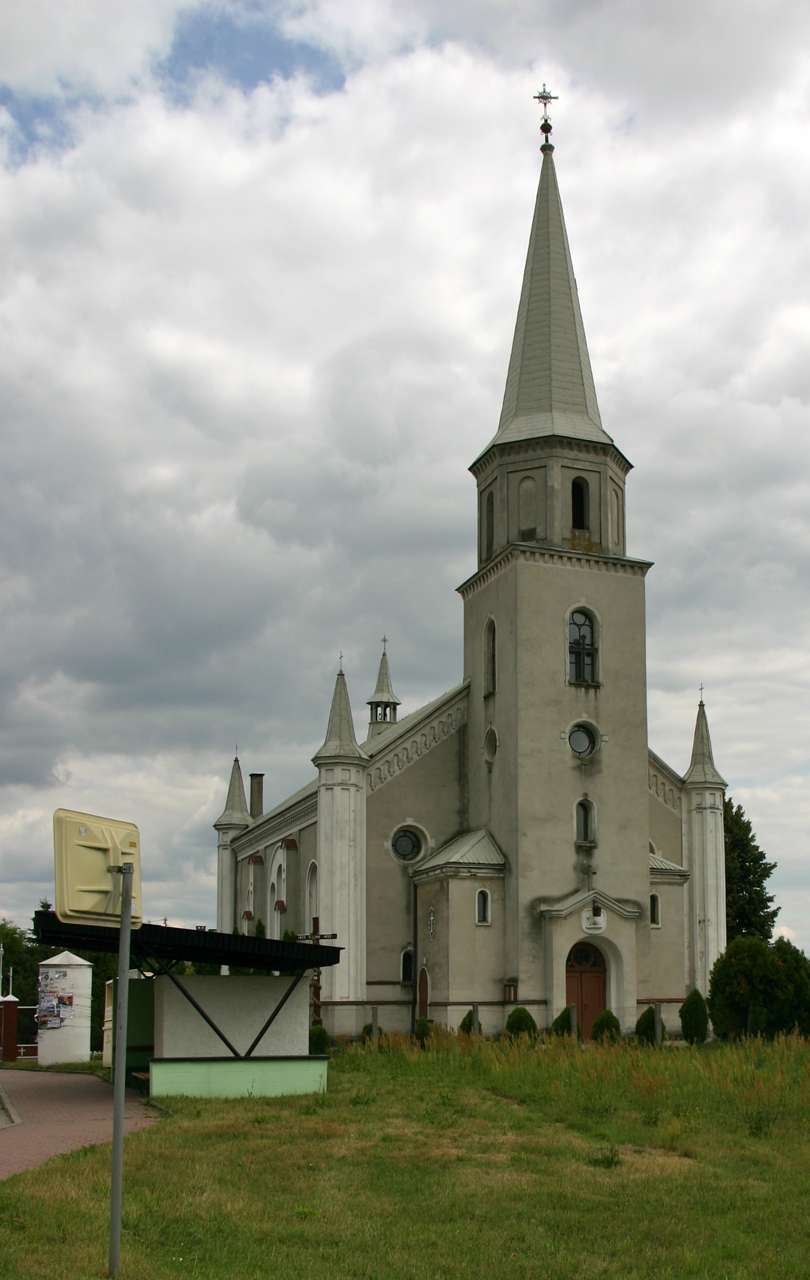 Obrowiec, ul. Krapkowicka 38 - rzymskokatolicki kościół parafialny pw. św. Jana Chrzciciela, 1869–88